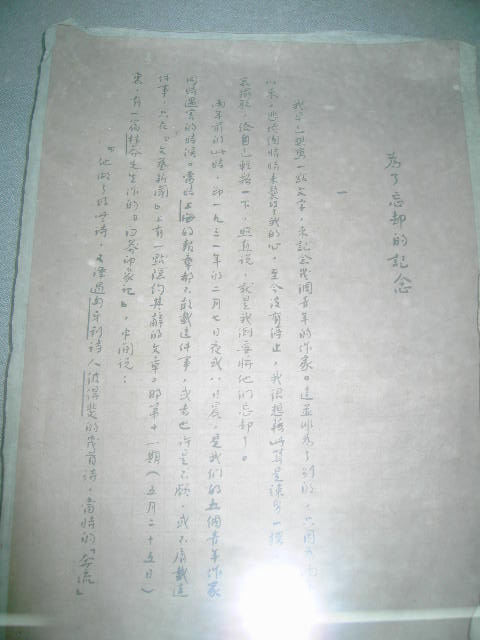 自己拍的